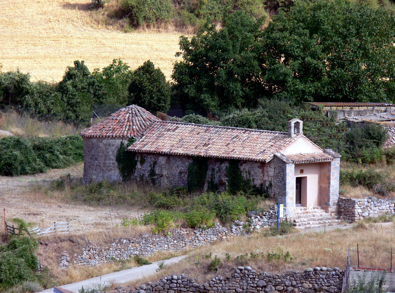 Ermita de San Andrés en Torrecilla en Cameros, La Rioja - España.